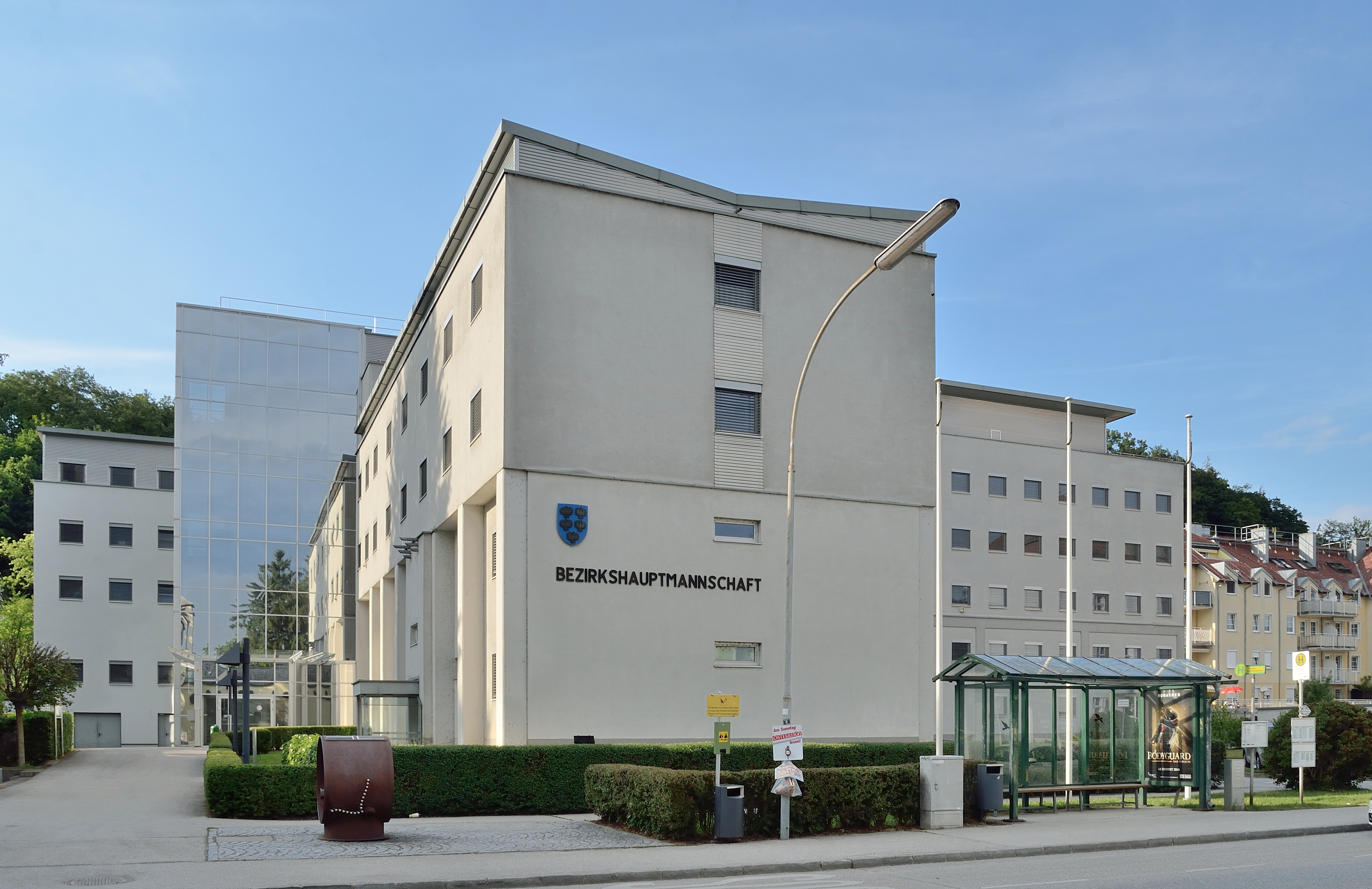 Bezirkshauptmannschaft Amstetten in der Preinsbacher Straße in Amstetten.